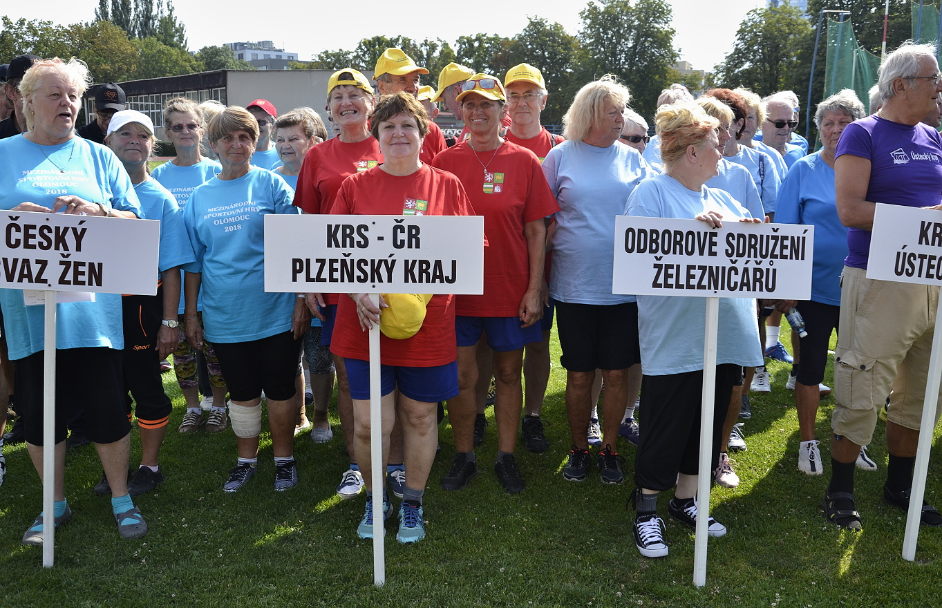 Nástup před soutěžemi